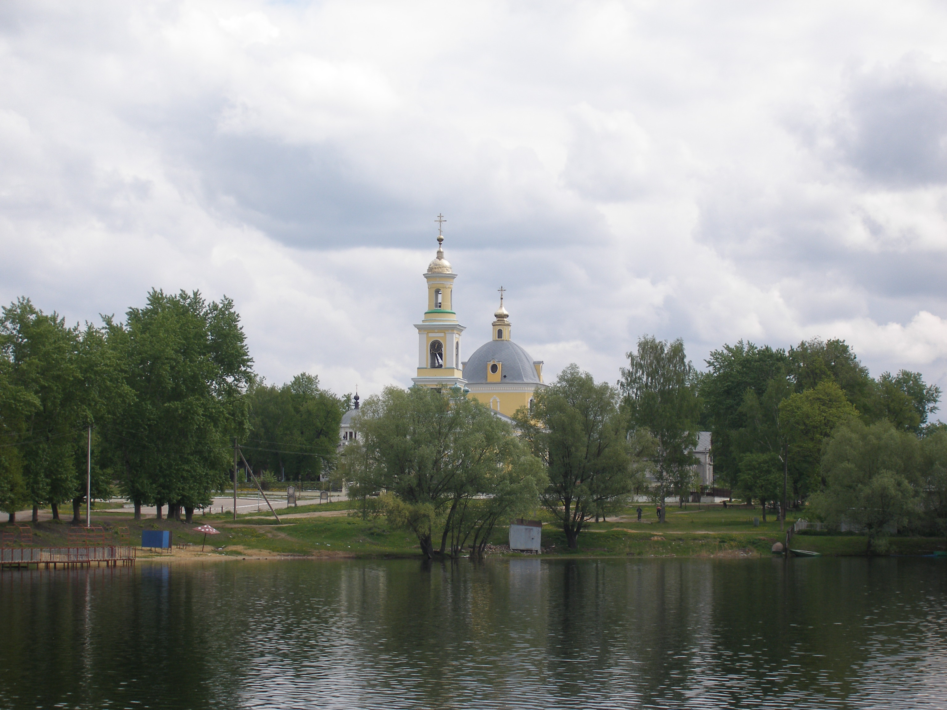 Выкса, Выксунская Церковь